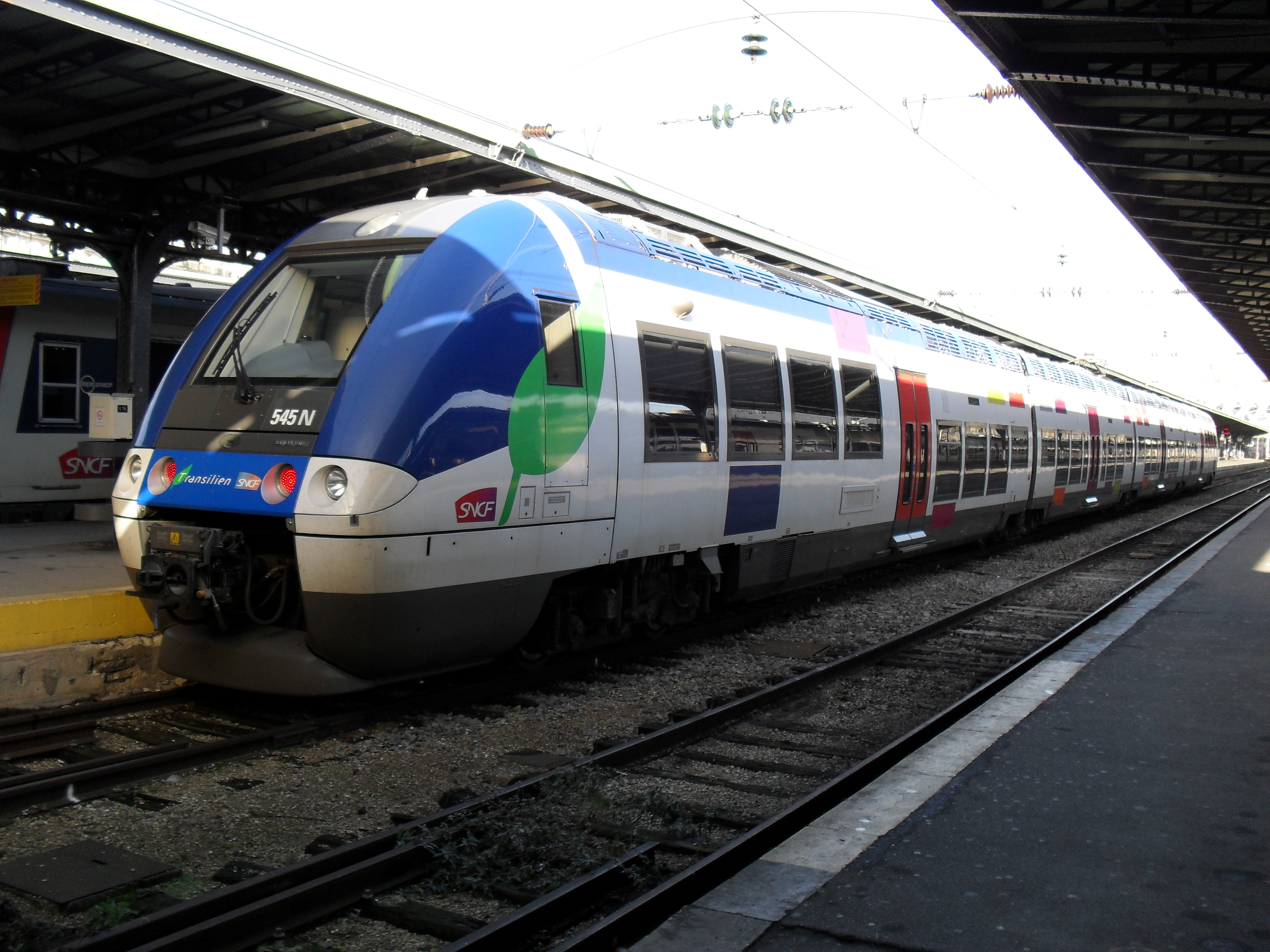 B 82500 Transilien à Paris-Est